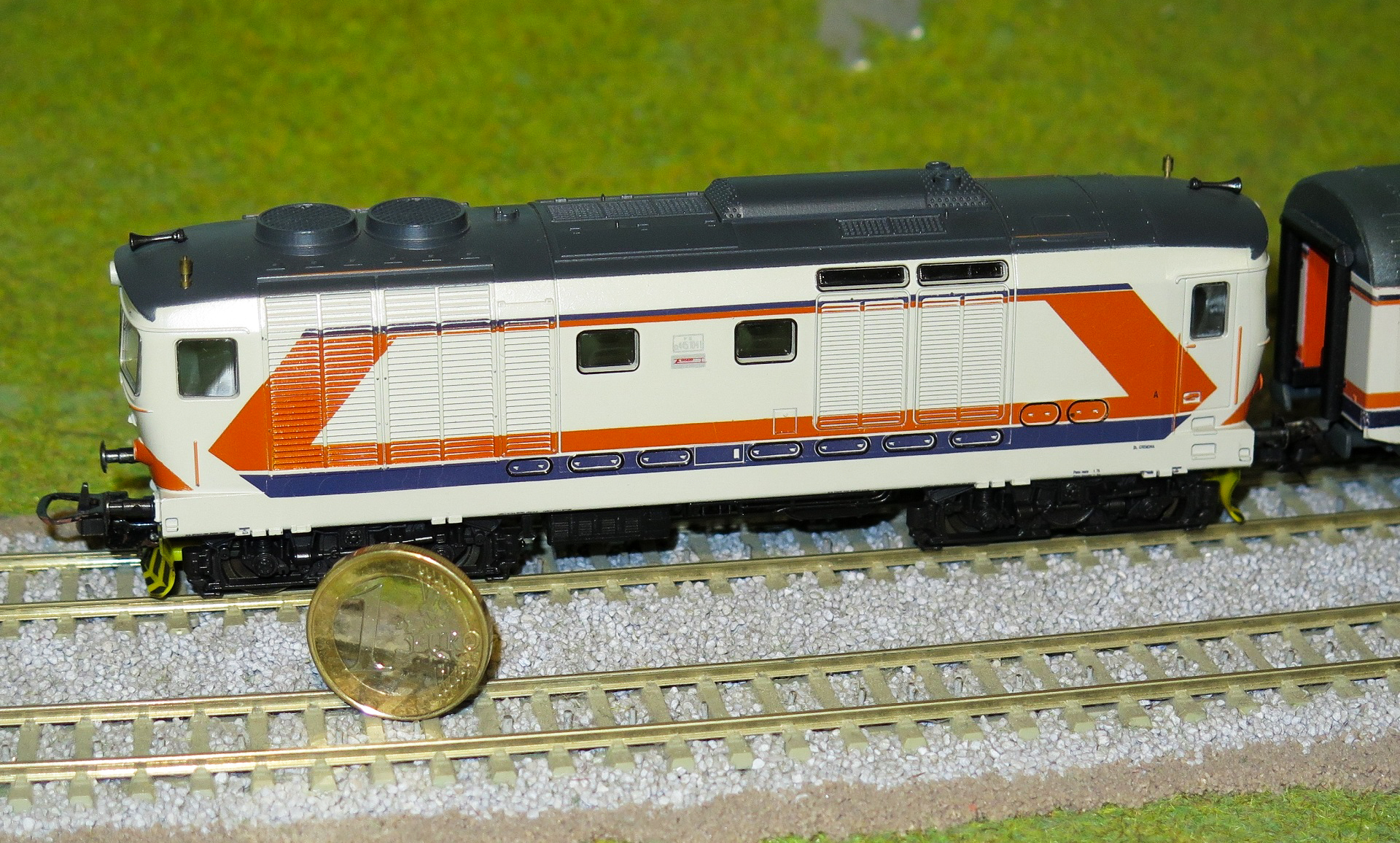 Lima Spur H0 FS D.445 Modelleisenbahn Diesellokomotive mit einer 1 Euro Münze zur Darstellung der Grössenverhältnisse auf Roco Geleisen mit Betonschwellen.